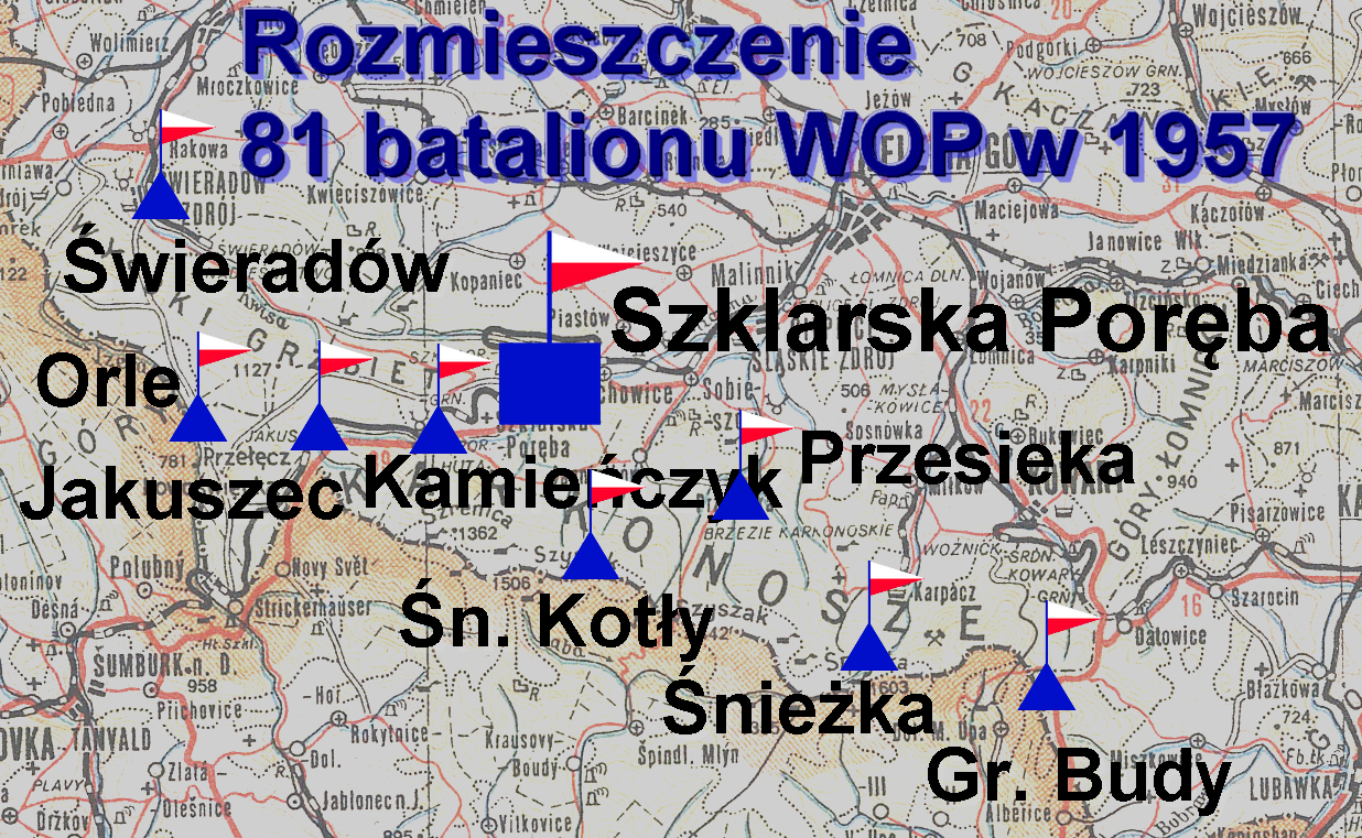 Rozmieszczenie 81 batalionu WOP w 1957